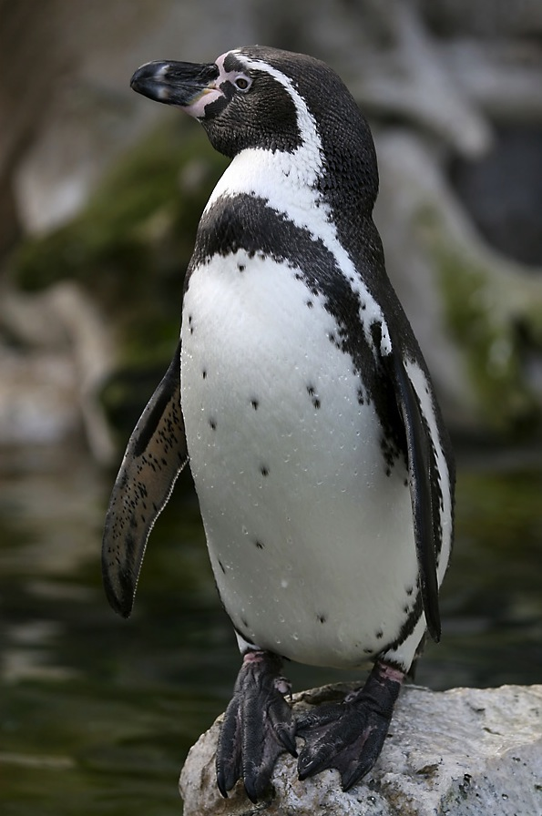 Humboldt Pinguin im Tiergarten Schönbrunn in Wien